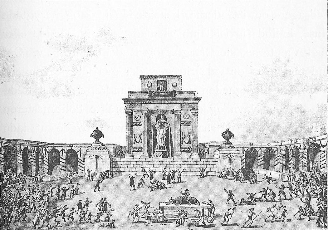 Bespisningen af folket på Christiansborgs Ridebane ved kroningen af Christian VII, 1767. Public feast for the people at the Ridingcourse at Christiansborg at the coronation of Christian VII of Denmark in 1767. Efter tegning i den Windingske Samling.